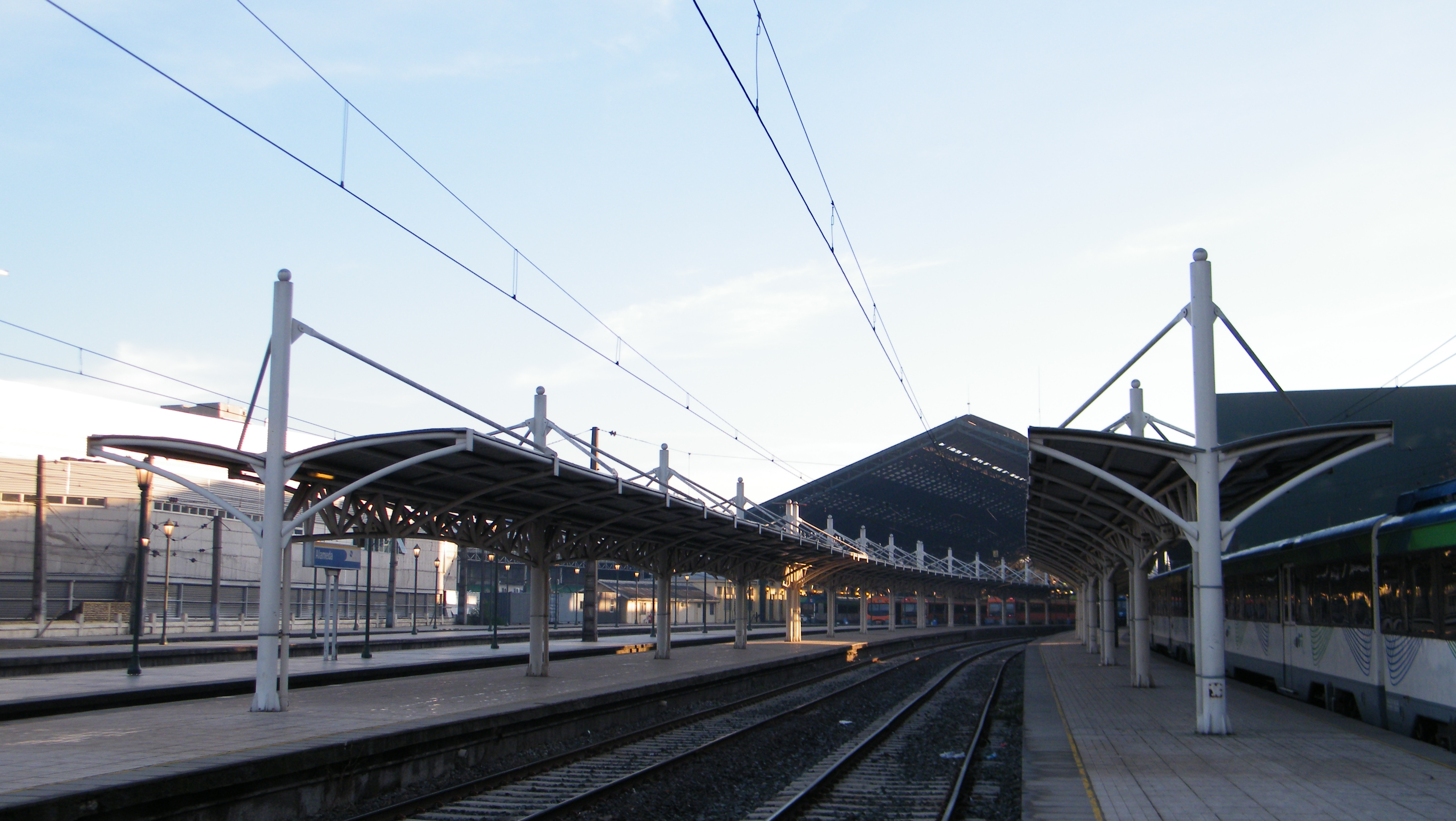 Estación Central de Ferrocarriles o Estación Alameda This is a photo of a national monument in Chile: 134